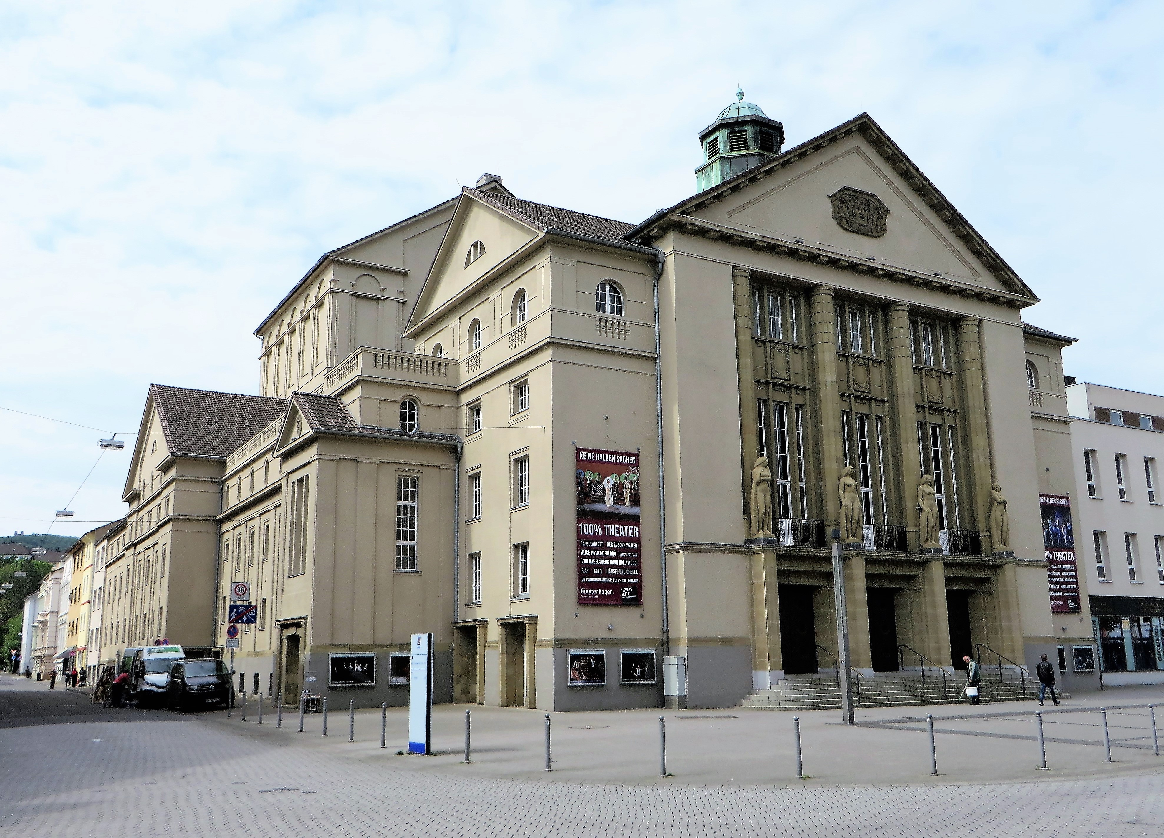 Denkmalgeschütztes Stadttheater in Hagen, Elberfelder Straße 61. Erbaut 1910–1911, Eröffnung am 5. Oktober 1911. In klaren neoklassizistischen Zügen von Architekt Prof. Dr. Ernst Vetterlein aus Darmstadt errichtet. Eingangsportal mit vier Plastiken der Bildhauerin Milly Steger. Im Jahre 2013 umfangreiche Gebäude-Renovierung mit der ursprünglich historischen Farbgestaltung. This is a photograph of an architectural monument.